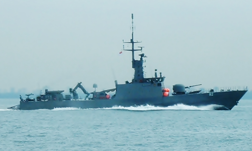 RSS Resilience.